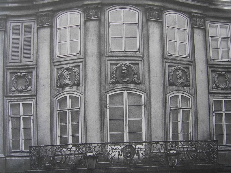 Dresden, Palais Boxberg, Waisenhausstraße Nr. 33, Hauptfassade, Ausschnitt aus dem Mittelrisalit, 1752 errichtet, 1899 abgebrochen